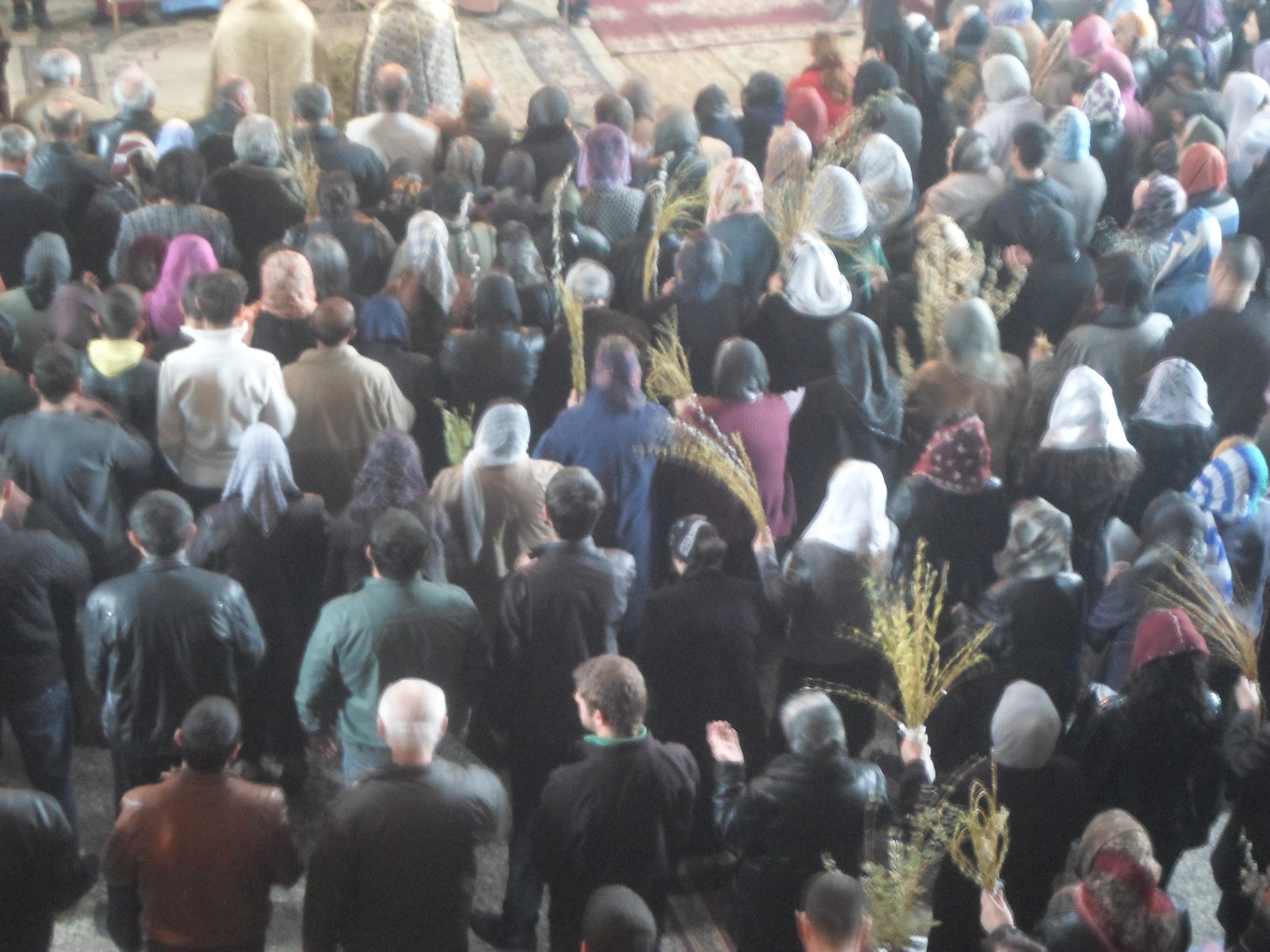 Ծաղկազարդը գյումրիի ս. Աստվածածին եկեղեցում